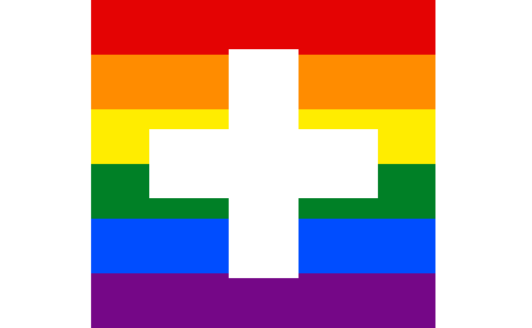 Bandera gay Suiza.